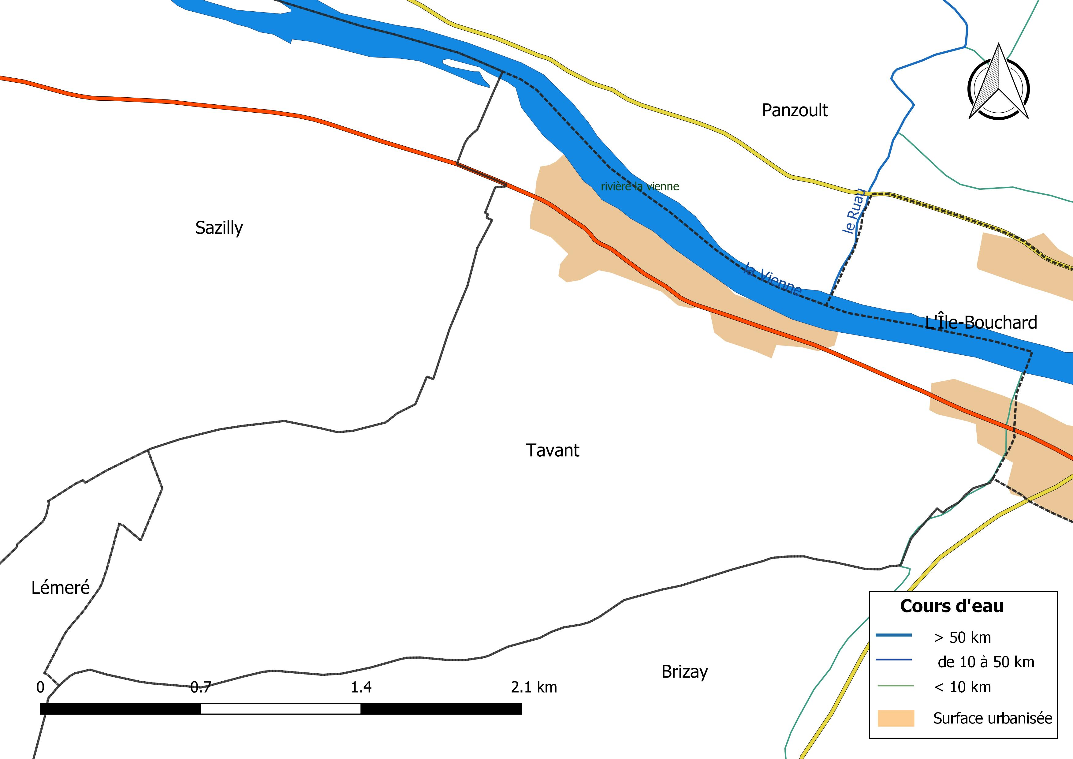 Carte du réseau hydrographique de la commune de Tavant (France).